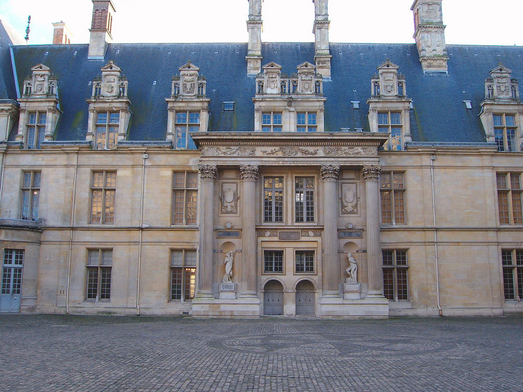 Südflügel des Schlosses Écouen vom Innenhof gesehen